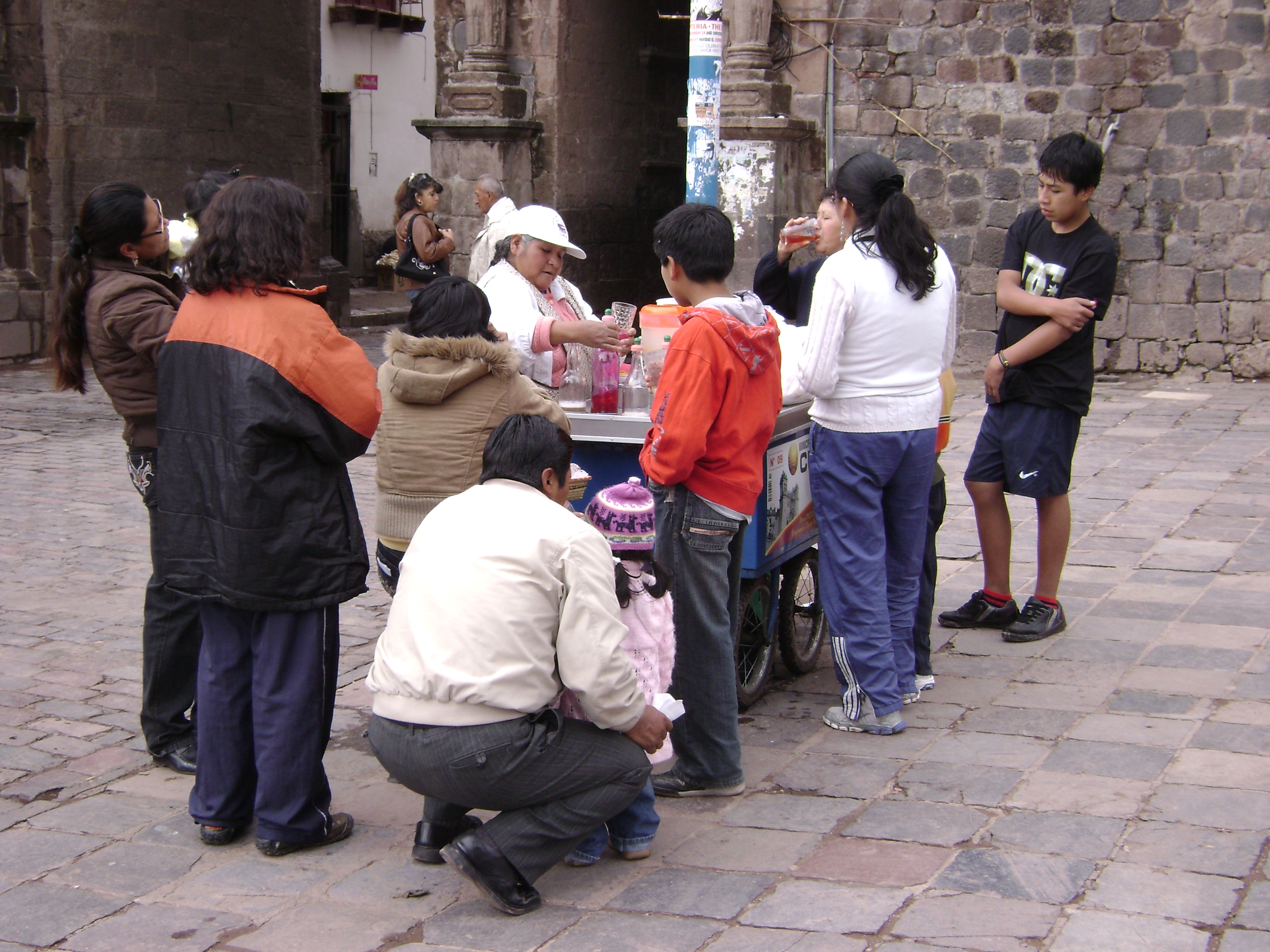 Emolientera, es decir, vendedora de emolientes.